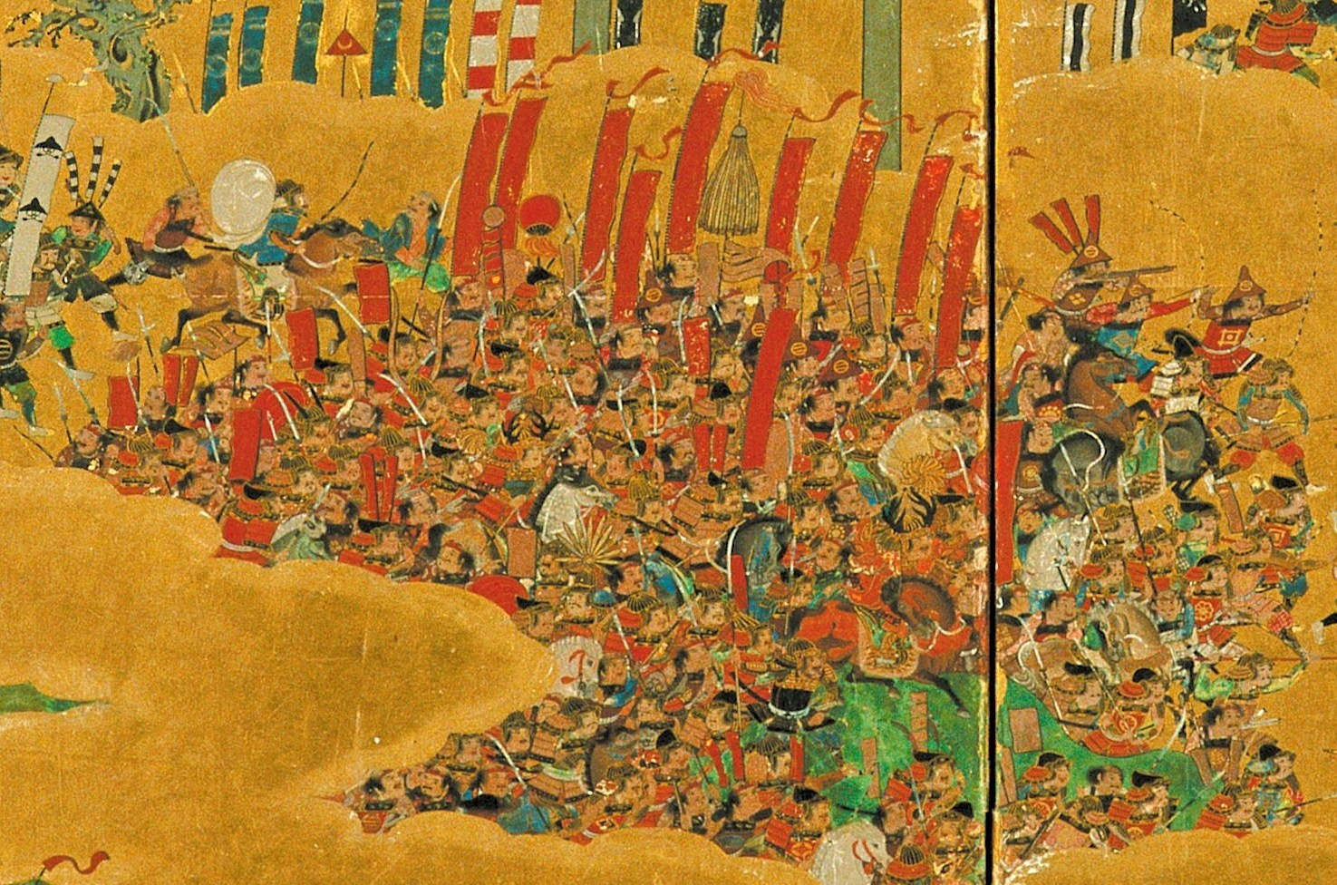 大阪夏の陣における真田の赤備え。『大坂夏の陣図屏風』の右隻より該当部分を切り出したもの。